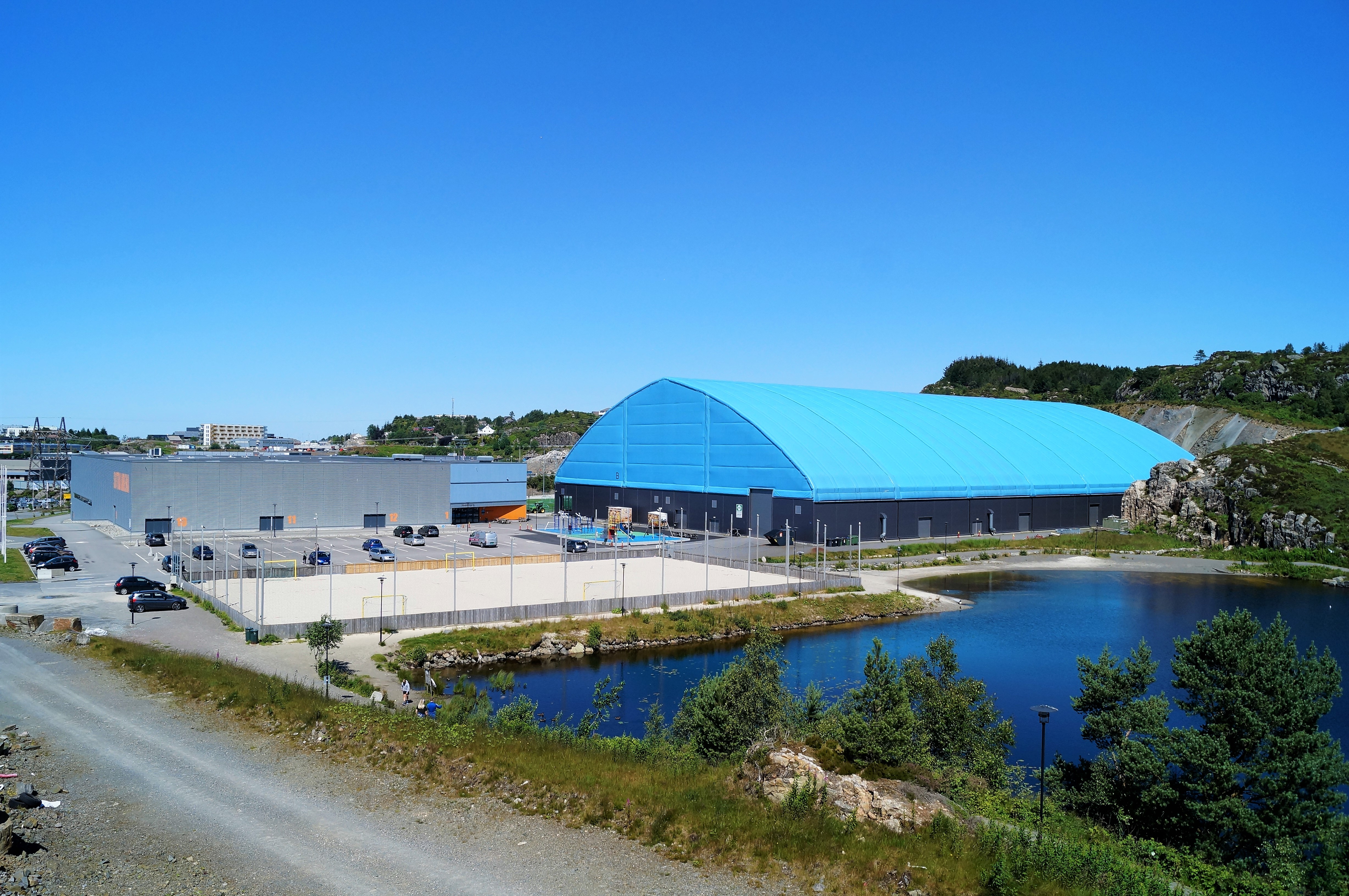 Sotra Arena